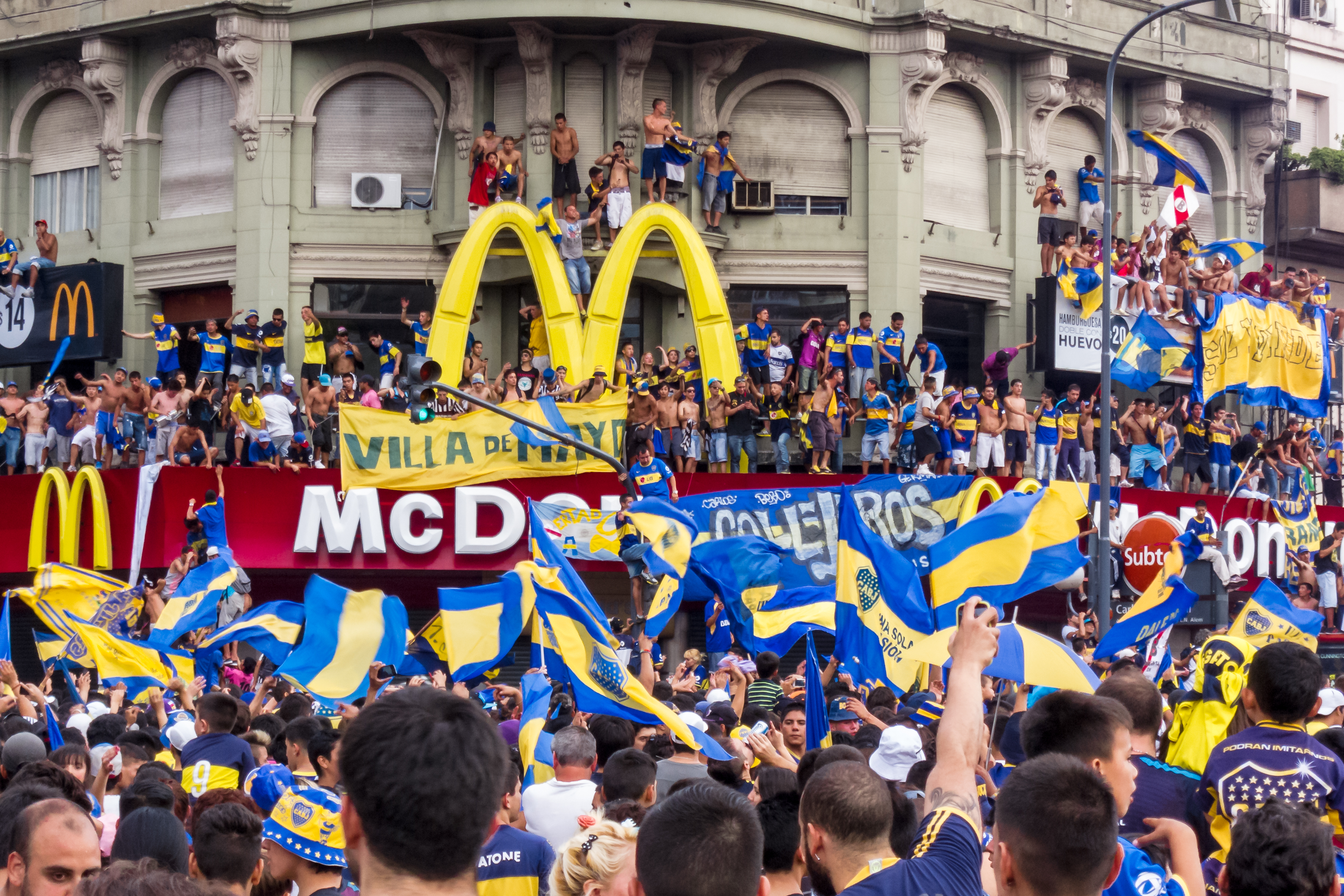 Festejos del día internacional del hincha de Boca Juniors en el Obelisco de Buenos Aires.